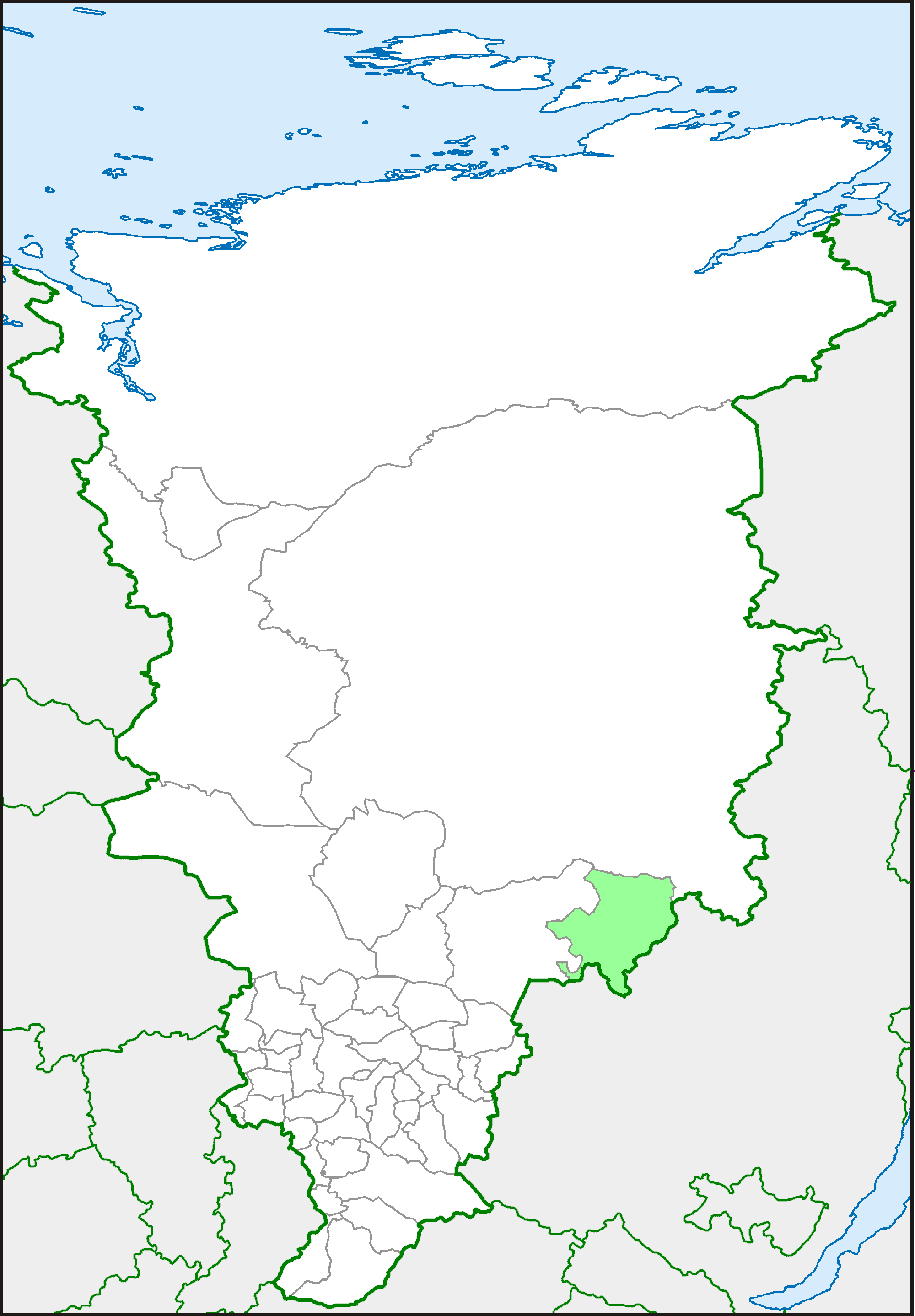 Кежемский район на карте Красноярского края